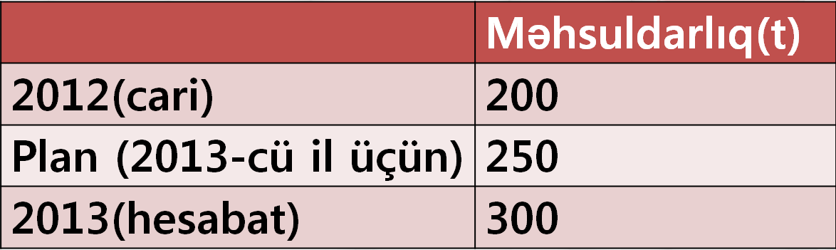 Plan tapşırığının yerinə yetirilməsi nisbi kəmiyyəti